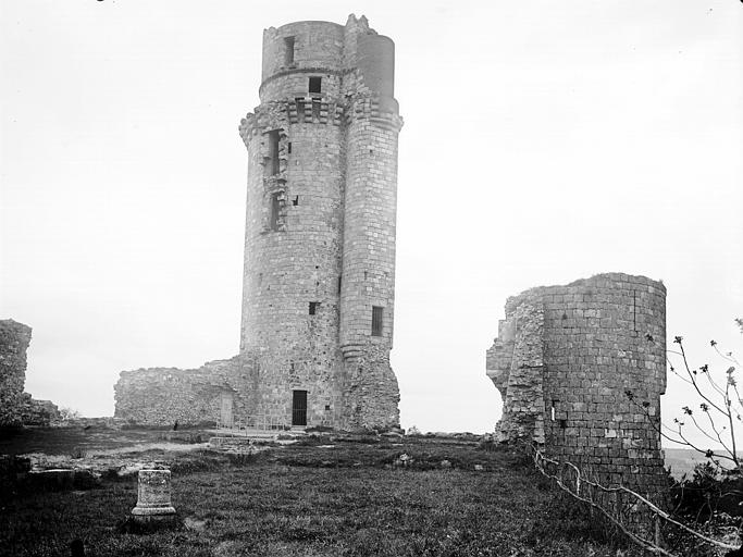 Prise de vue du château de Montlhéry avant 1897, par Félix Martin-Sabon.